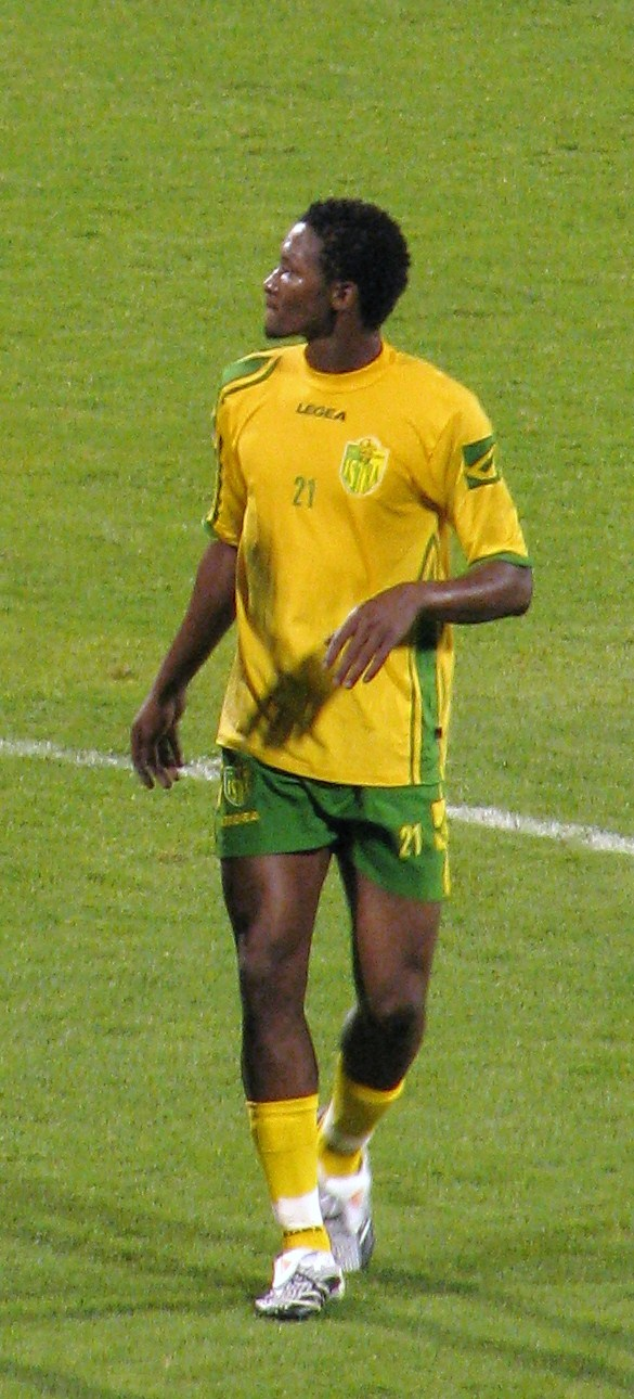 Mohamed Kalilou Traoré